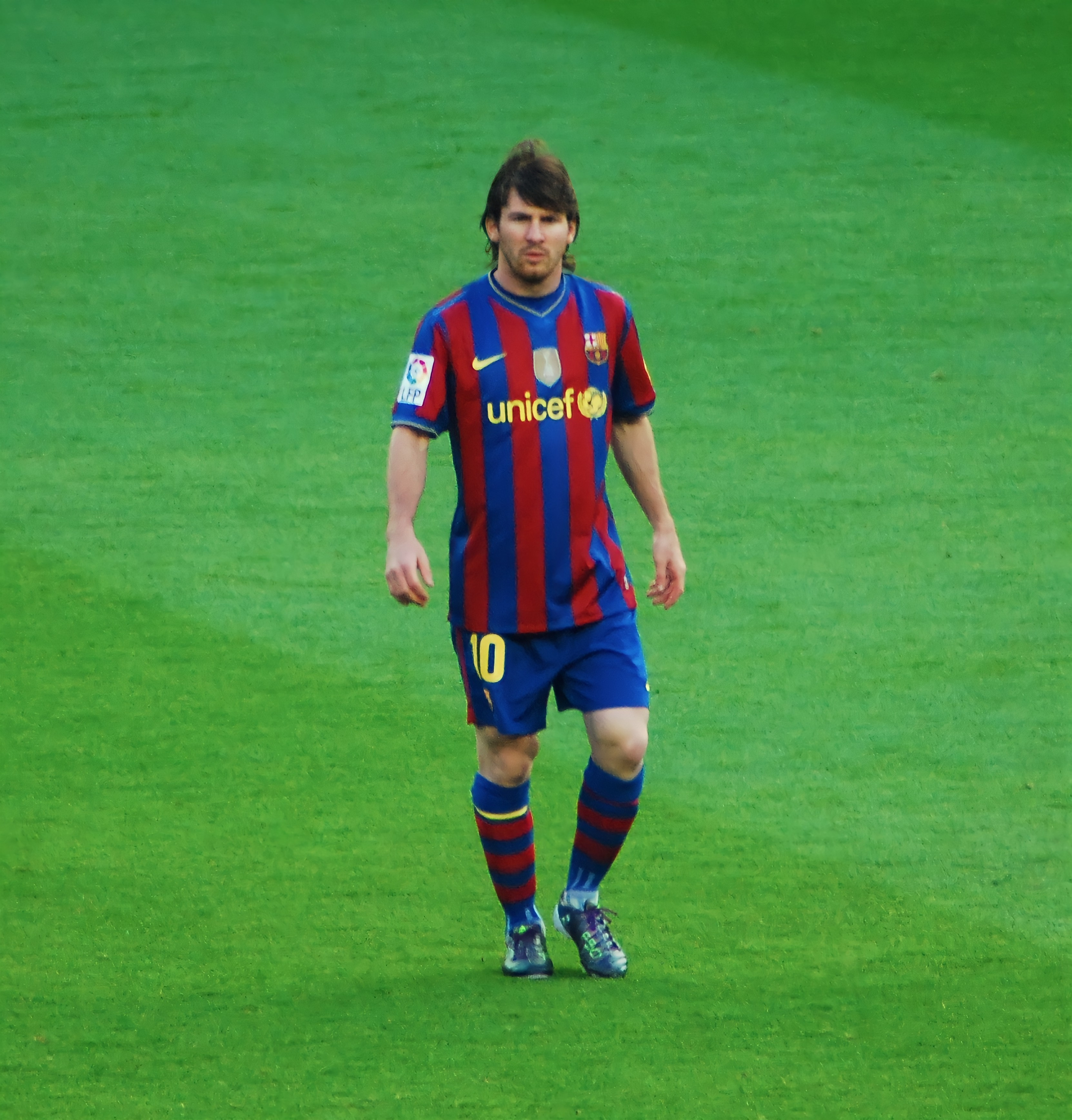 Lionel Messi, en un partido de la Liga 2009-2010 que enfrentó al FC Barcelona contra el Real Valladolid.